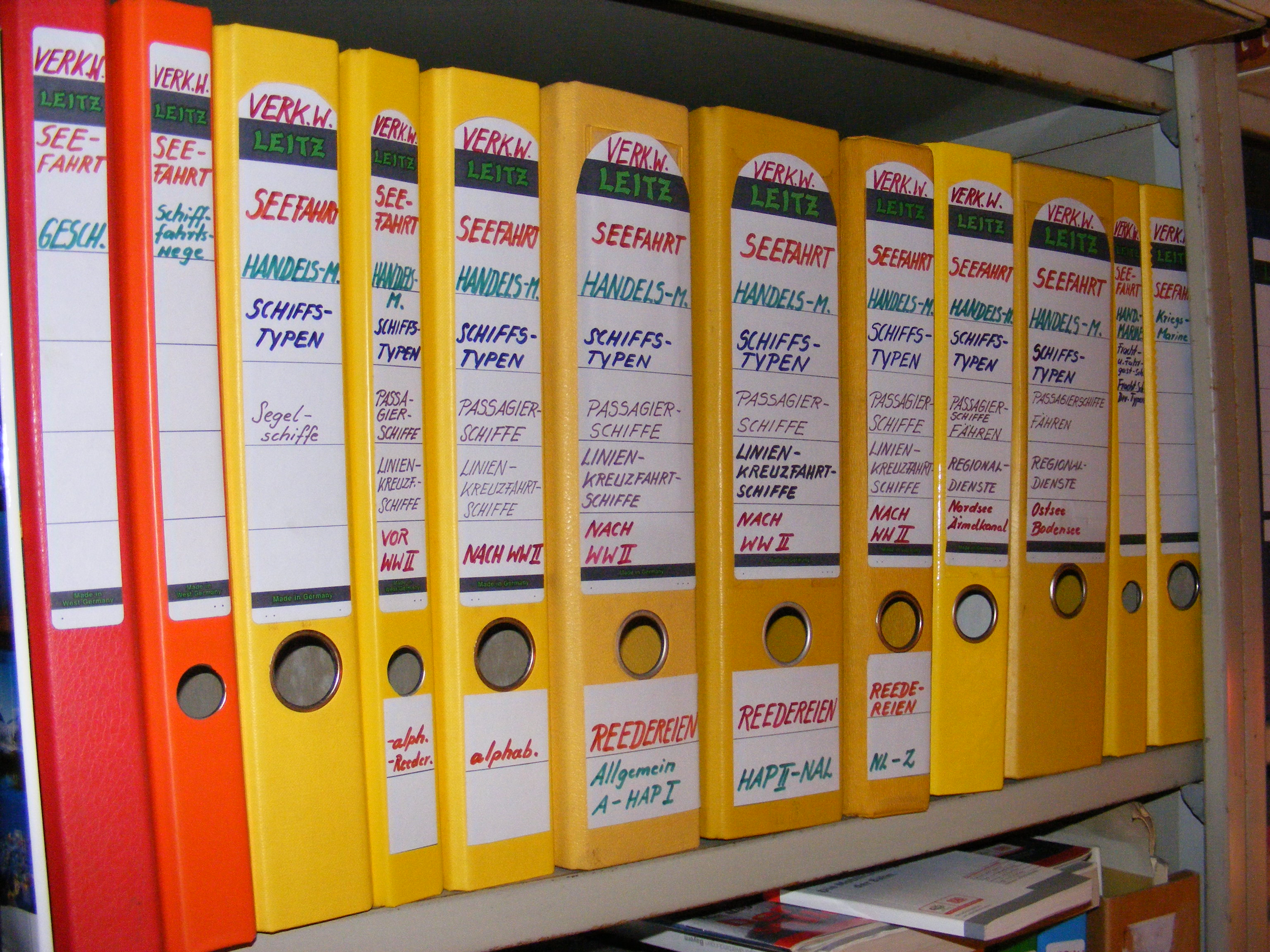 Mehrere Aktenordner für DIN A4, stehend, mit beschrifteten Rückenschildern (Schifffahrt).